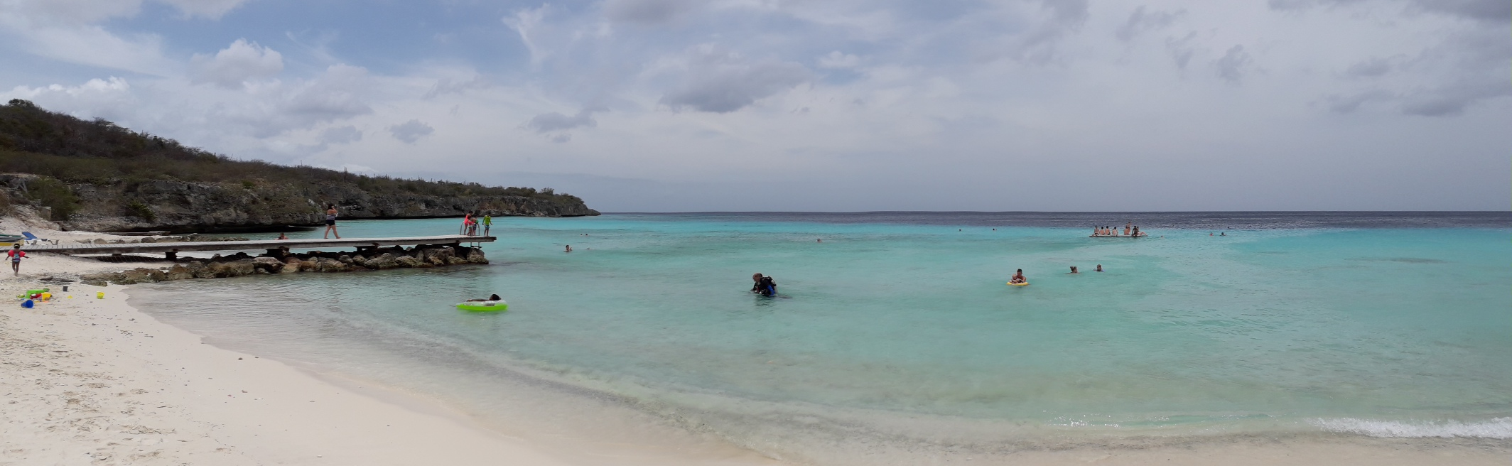 Strand Porto Mari in Curacao